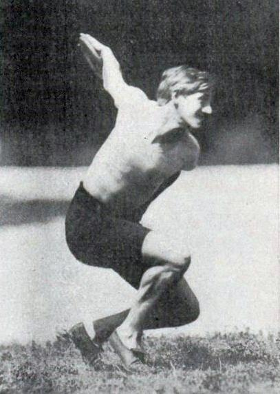 Guillaume de Saint Cyr, avec le RCF champion de France du saut en hauteur 1896 et du lancer du disque 1897 (record personnel 29 m 94 en 1897). Également vice-champion de France du saut en hauteur 1895, vice-champion du lancer du poids 1899, vice-champion du lancer du disque 1899, 3e du saut en hauteur 1897 et 1898, 3e du lancer du disque 1898, 1900 et 1902, et 4e du 400 mètres 1897. Sergent aviateur durant le premier conflit mondial, avec la médaille militaire.